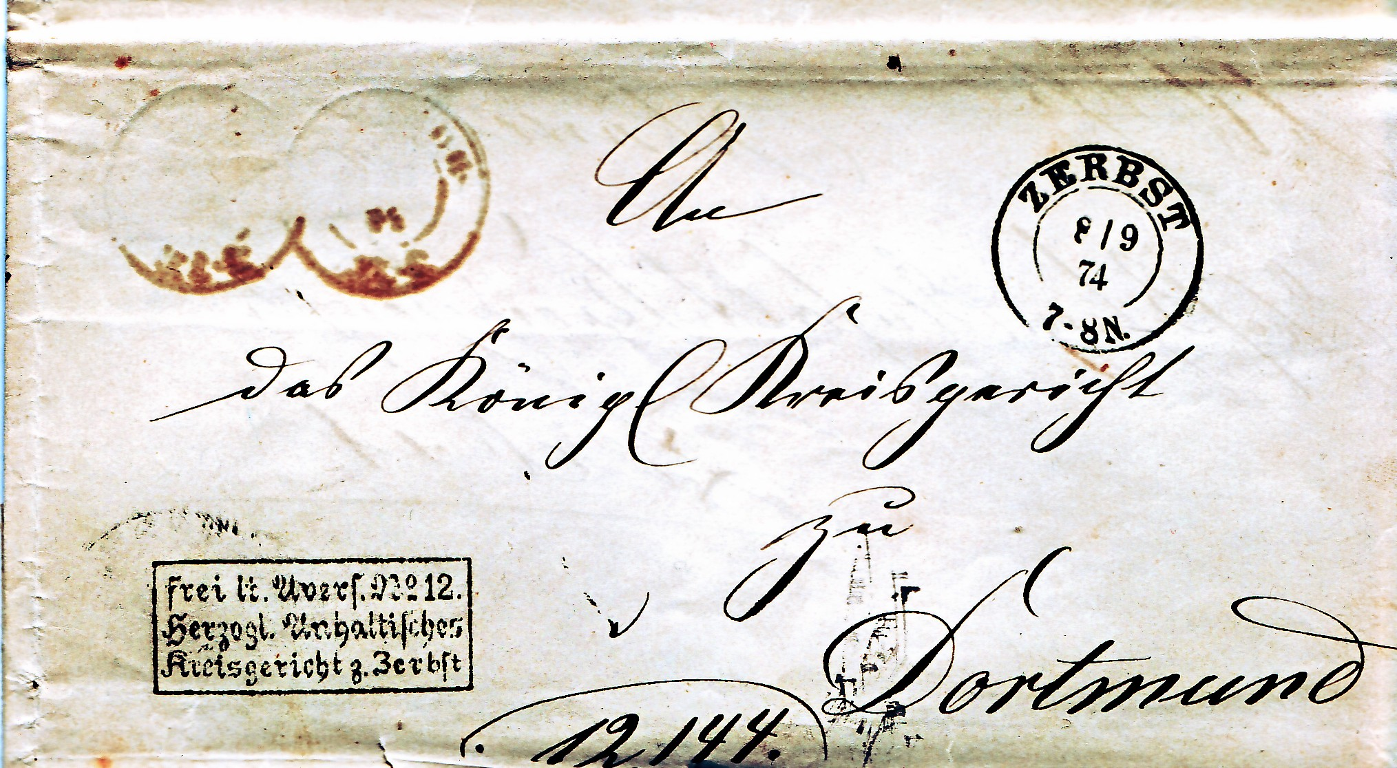 Briefumschlag mit Freistempelung von Zerbst nach Dortmund